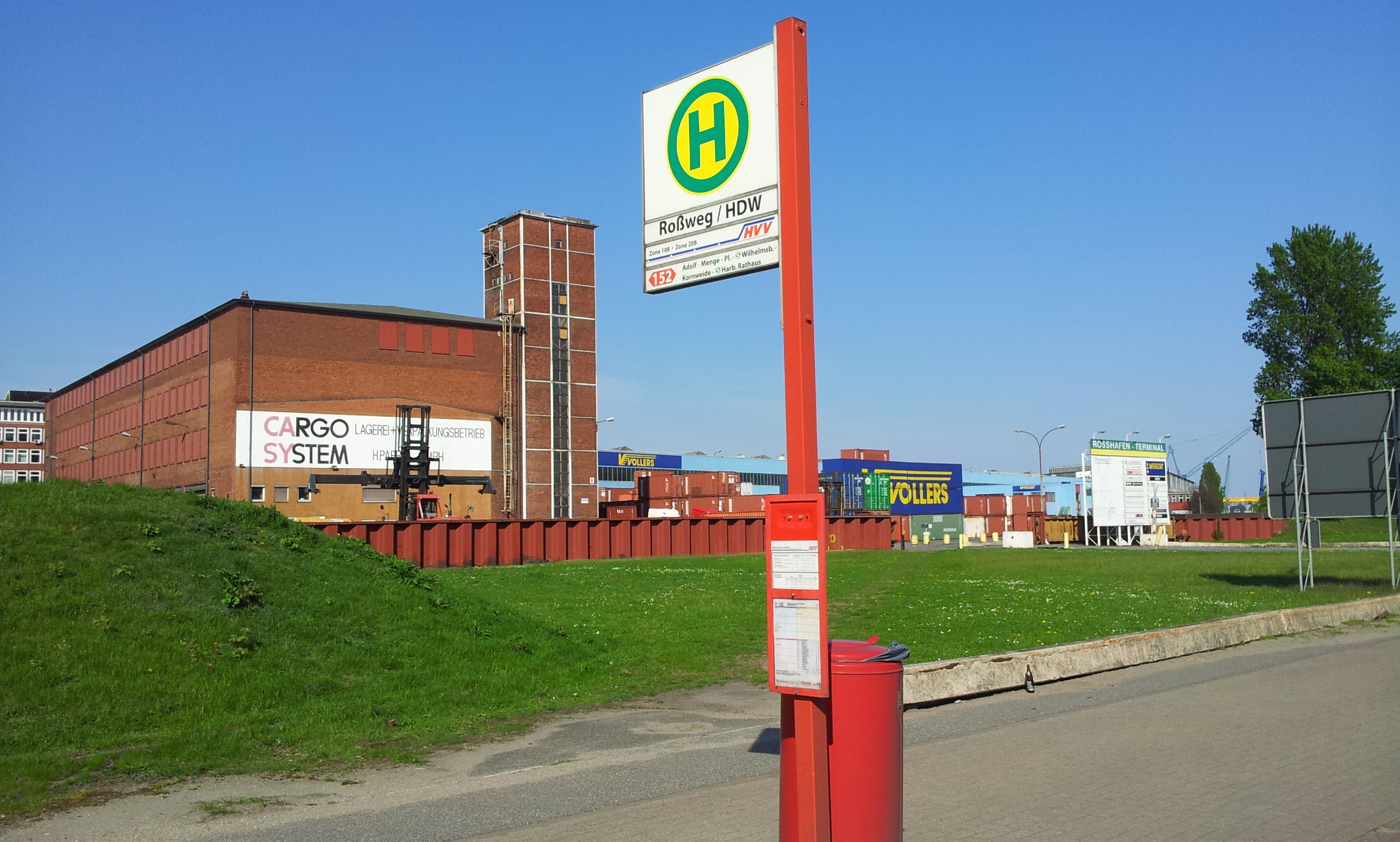 bushaltestellte am ehemaligen werkseingang der hdw hamburg